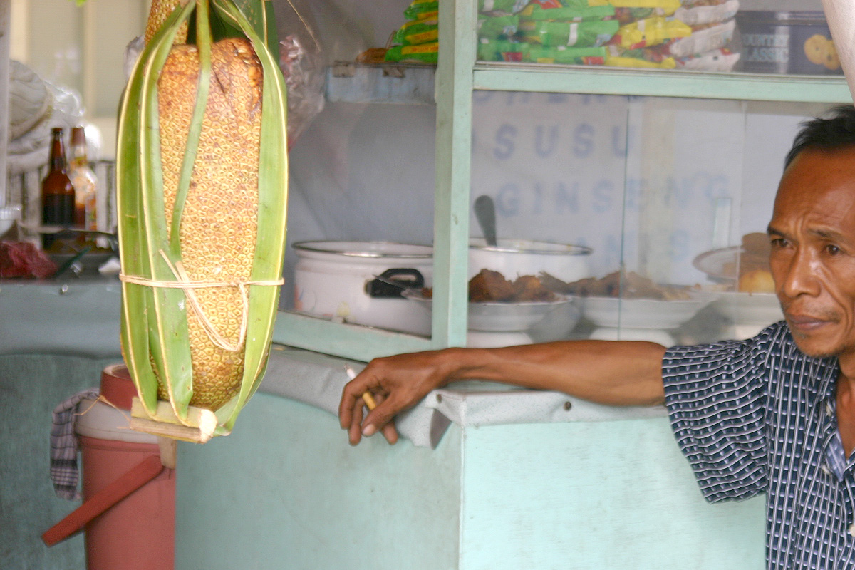 Nangka / Jackfruit